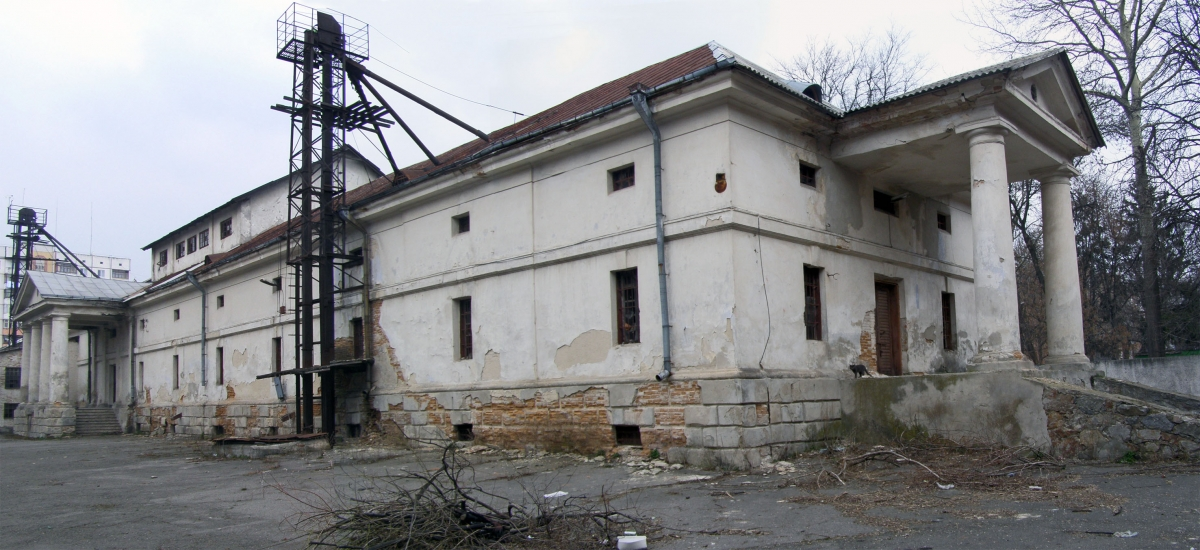 Склади Браницьких у Білій Церкві